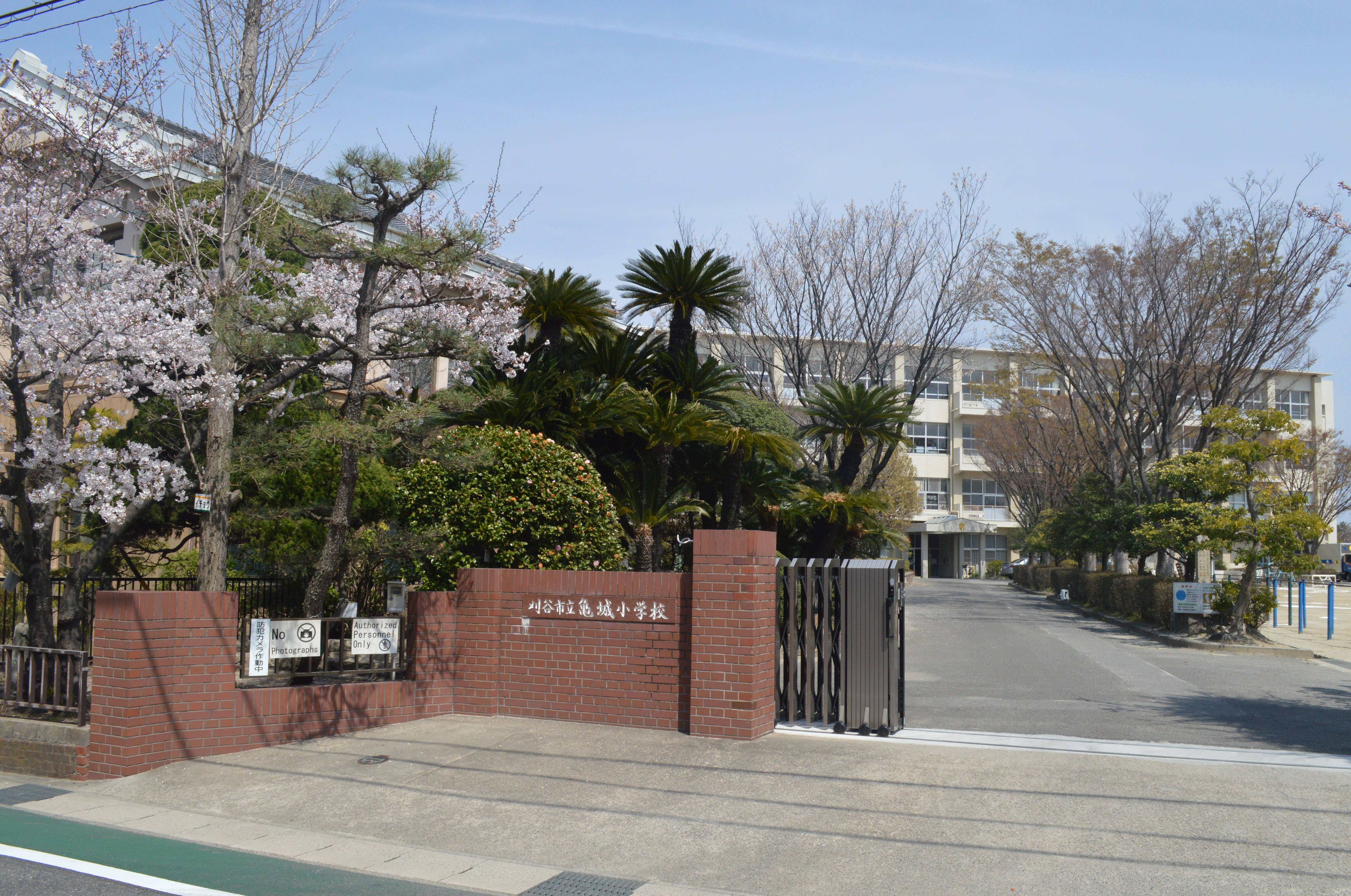 刈谷市立亀城小学校